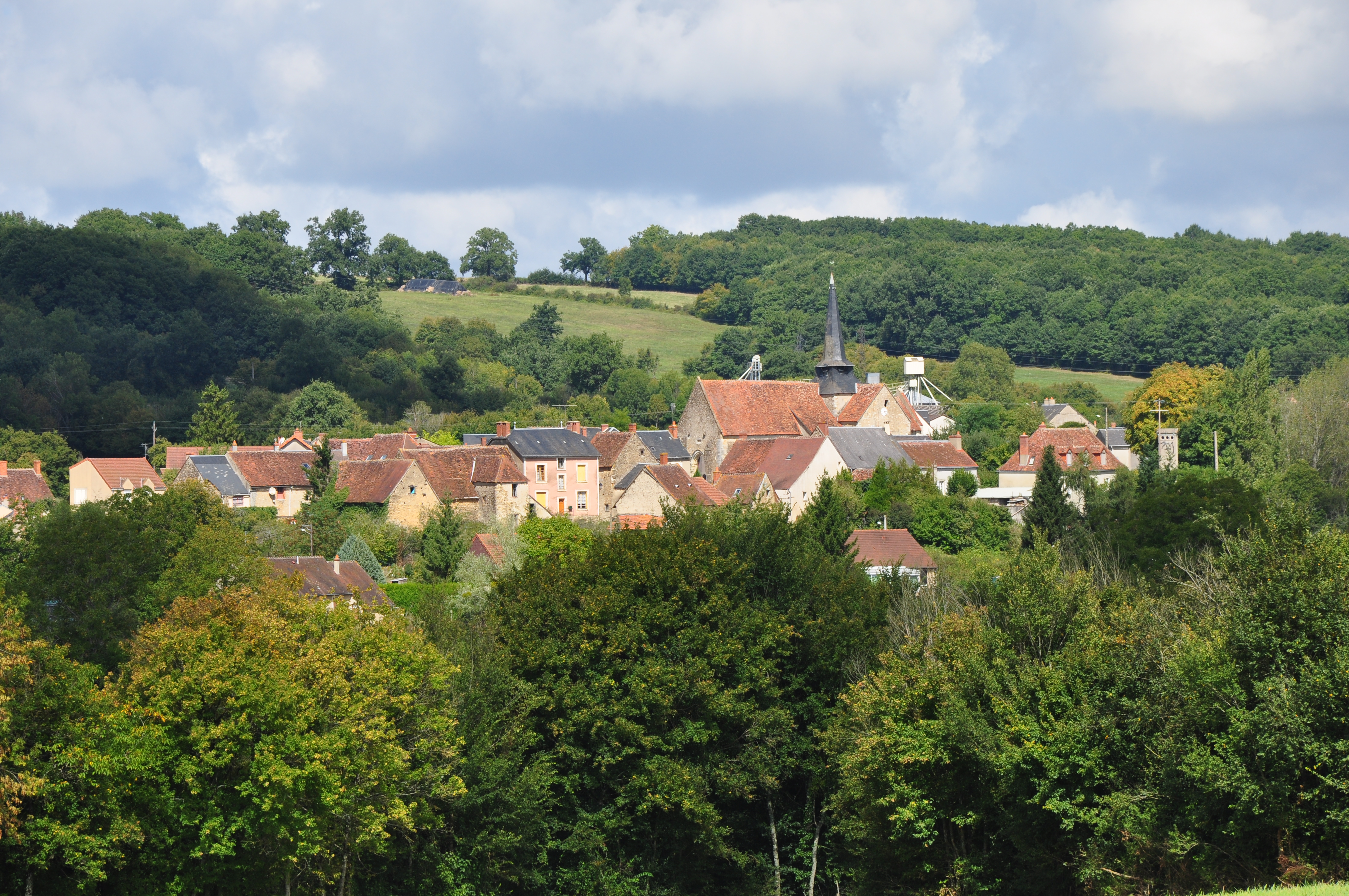 Vue générale du bourg de Chavin (Indre)